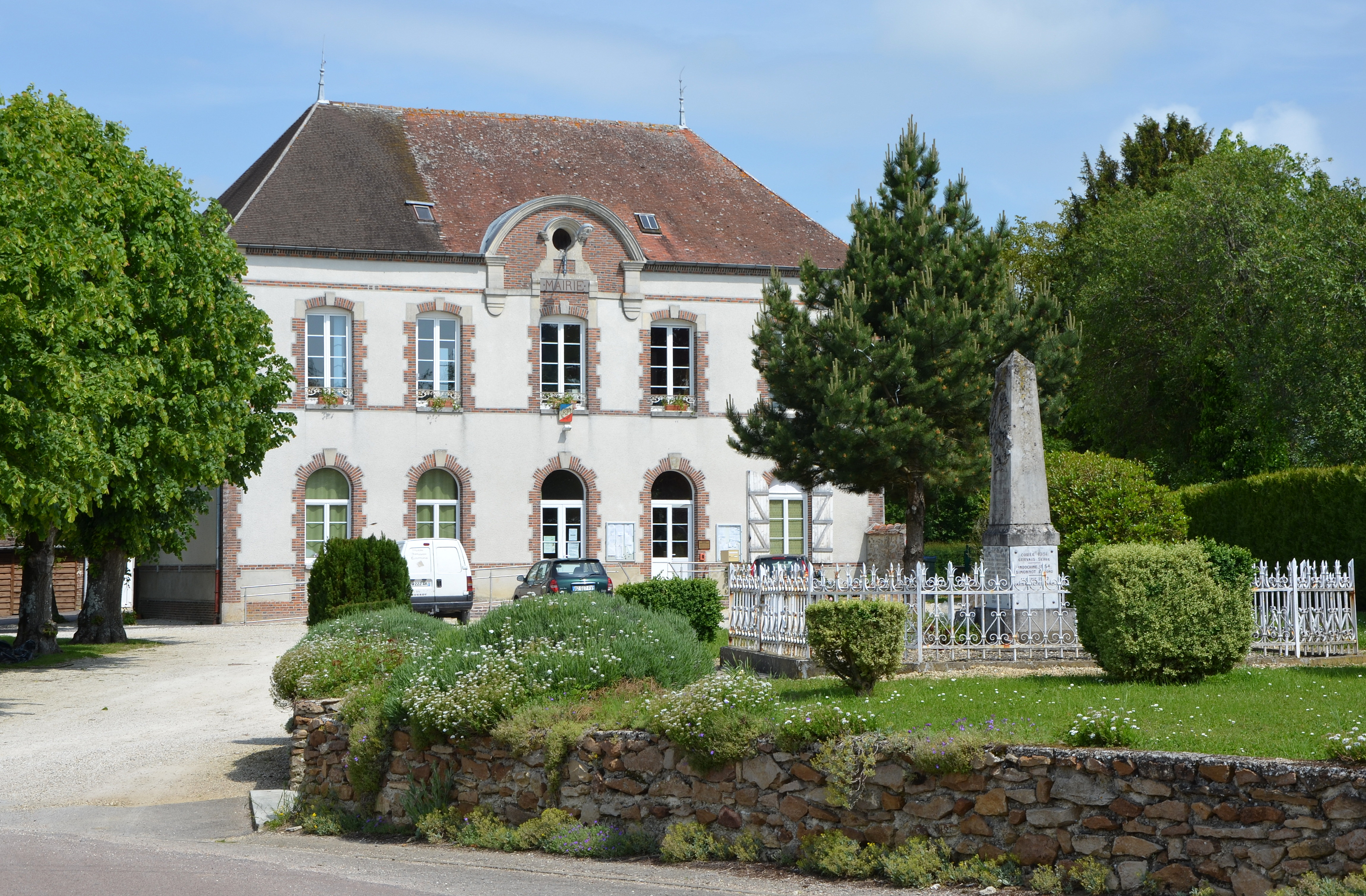 Mairie de Montpothier, Aube, France